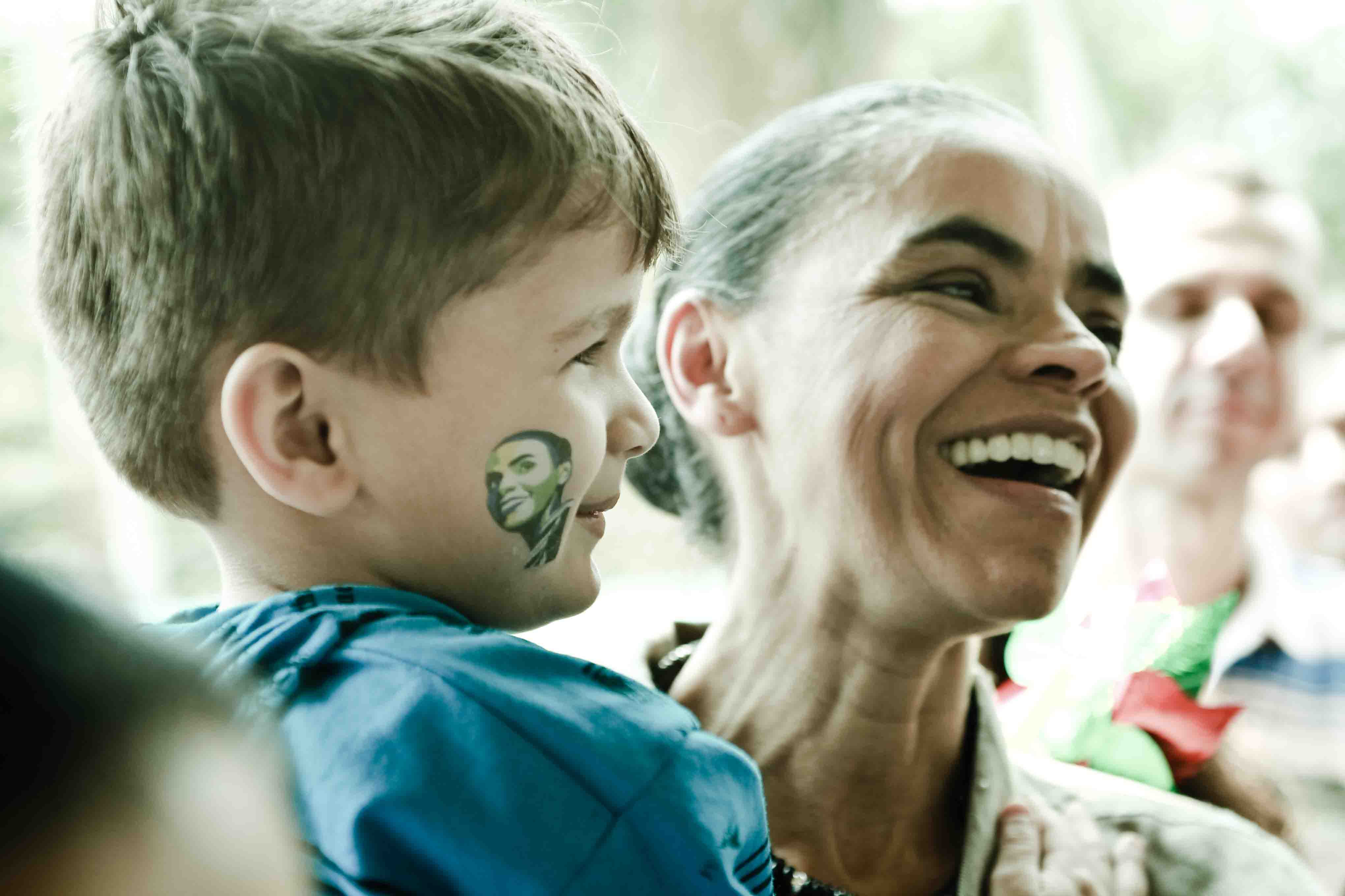 Amazônia Alerta recebe Marina Em visita a sua terra natal, Marina Silva participa de encontro chamado Amazônia Alerta (Foto: Cacá Meirelles)